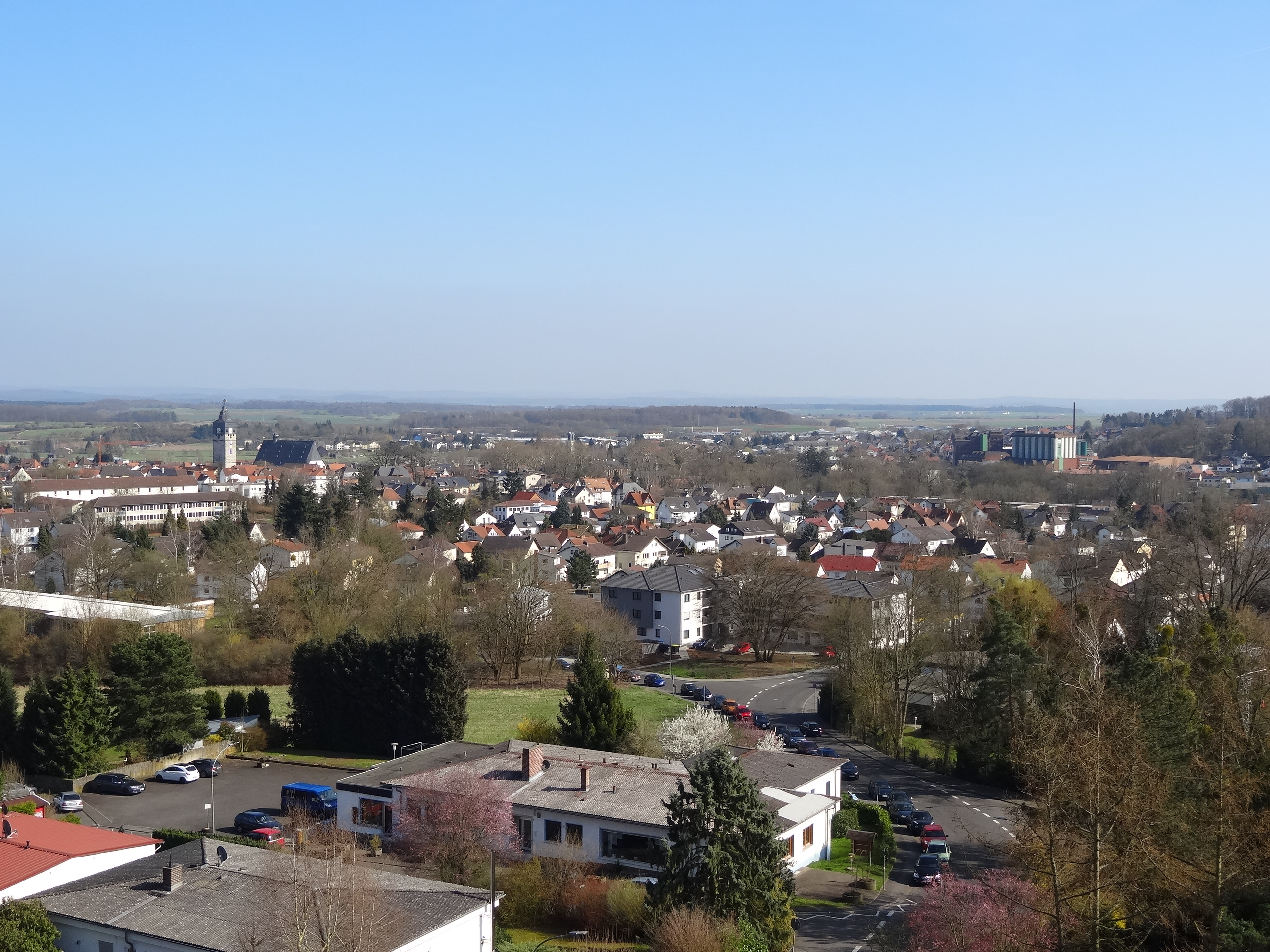 View of Lich